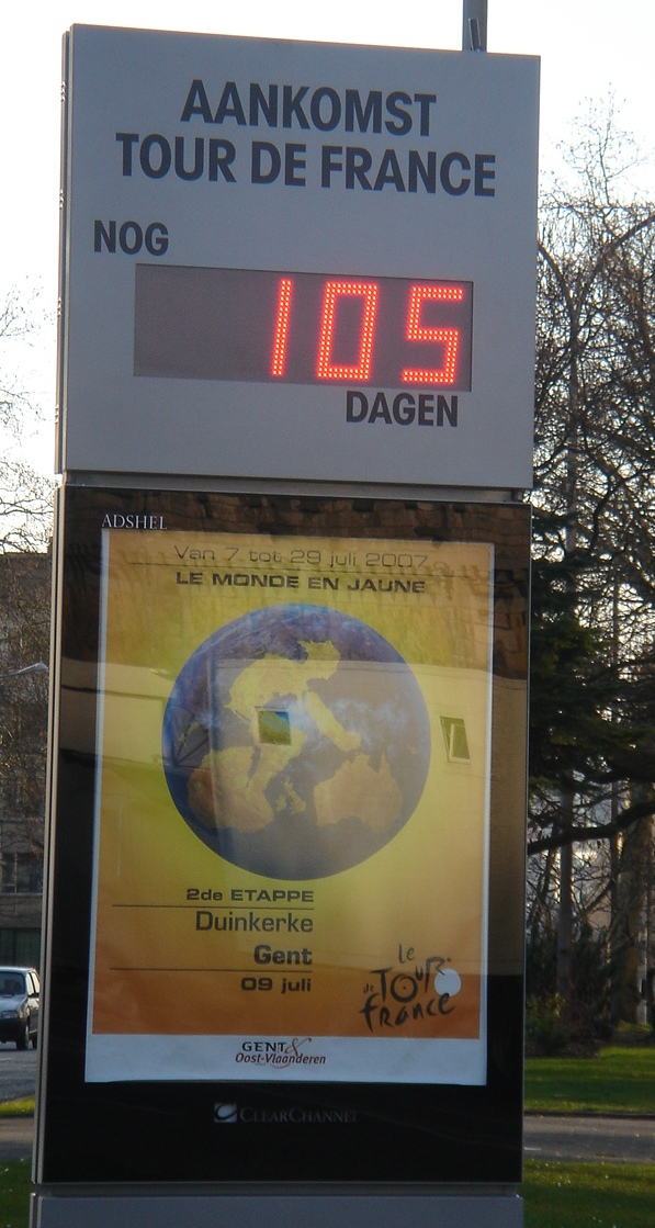 105 days til Tour de France in Ghent / nog 105 dagen tot de aankomst in Gent